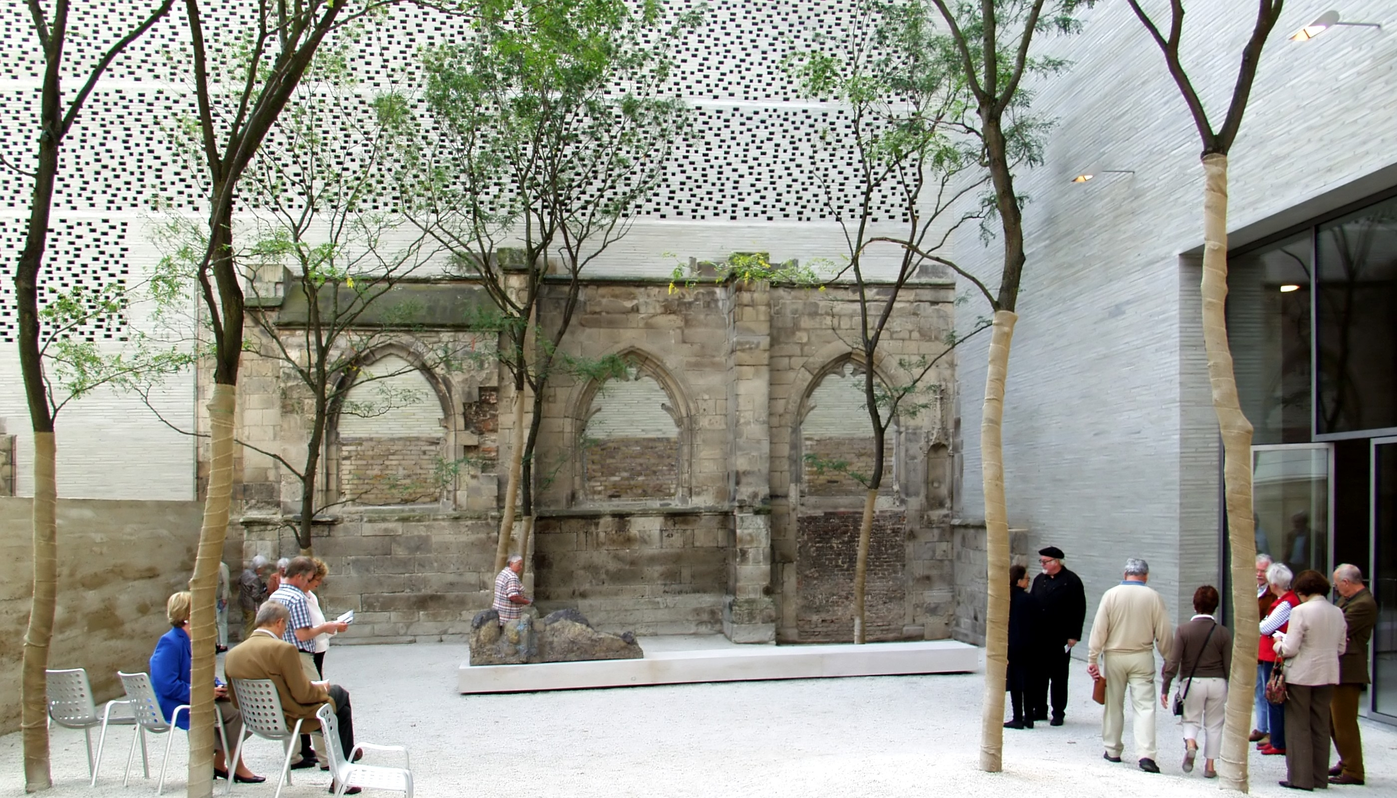 Innenhof vom Kolumba (Museum), Köln, mit Resten der im Zweiten Weltkrieg zerstörten Kirche St. Kolumba